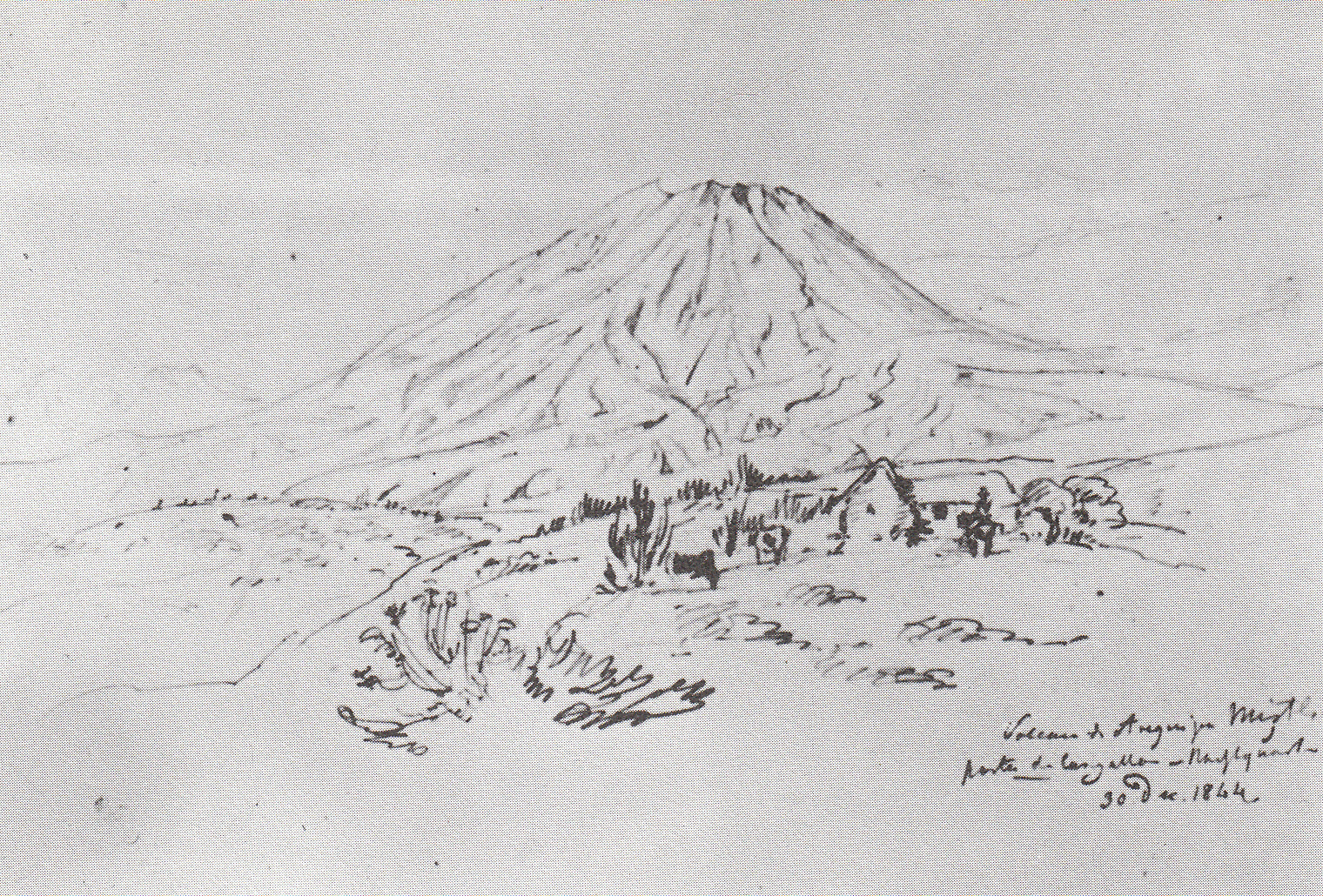 El volcán Misti visto desde la posta de Cangallo, 30 de diciembre de 1844